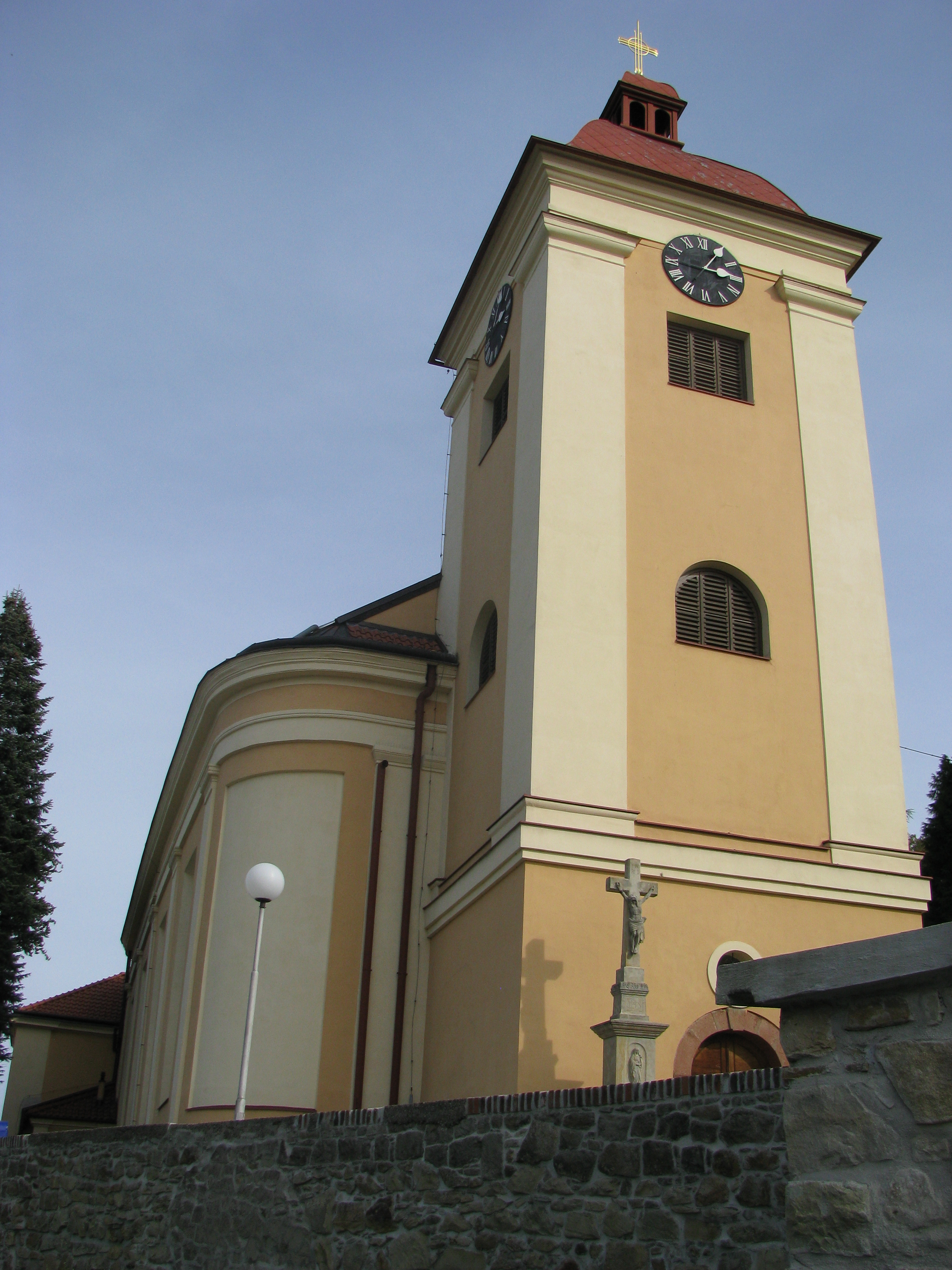 Kostel sv. Mikuláše (Zlín), nám. Jarolímkovo, Zlín